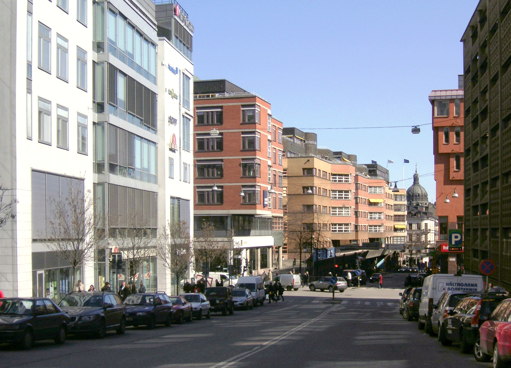 Mäster Samuelsgatan i Stockholm, sedd från Malmskillnadsgatan österut.